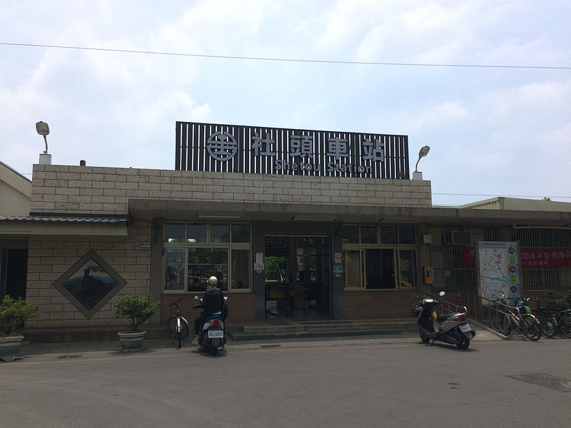 更新社頭車站目前新改建站體之照片